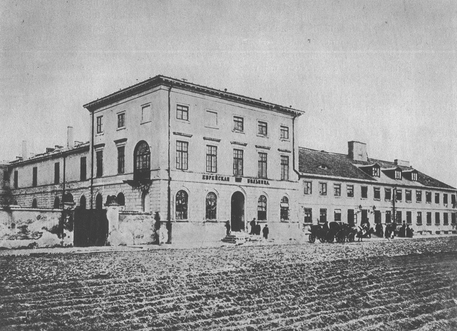 Stary Szpital Żydowski w Warszawie ulica Inflancka róg ul. Pokornej